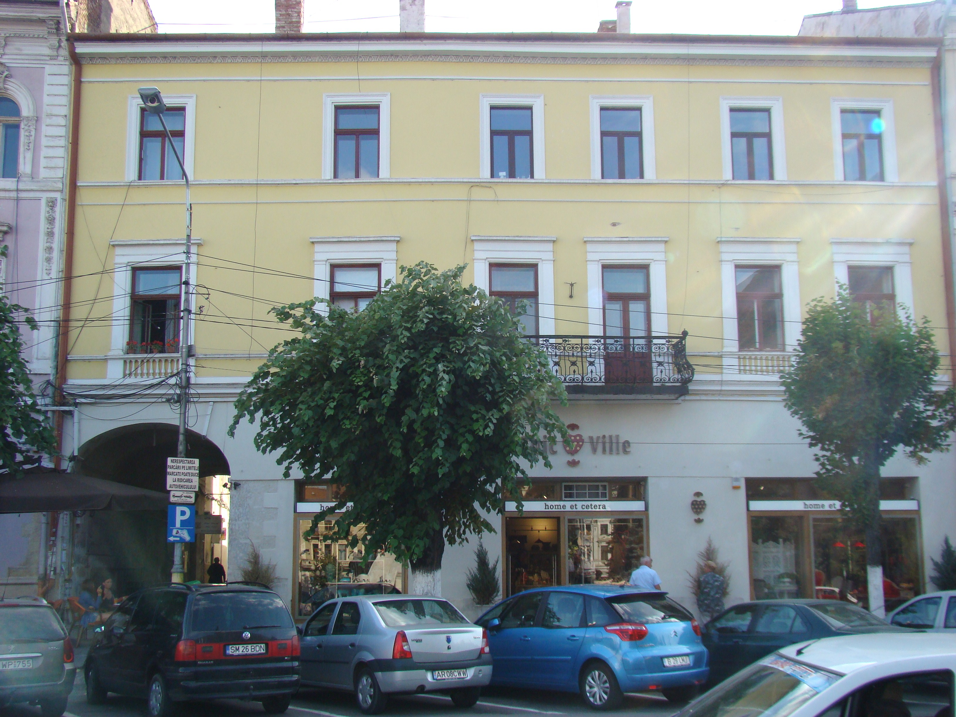 Clădire monument istoric, Piața Unirii, nr.13